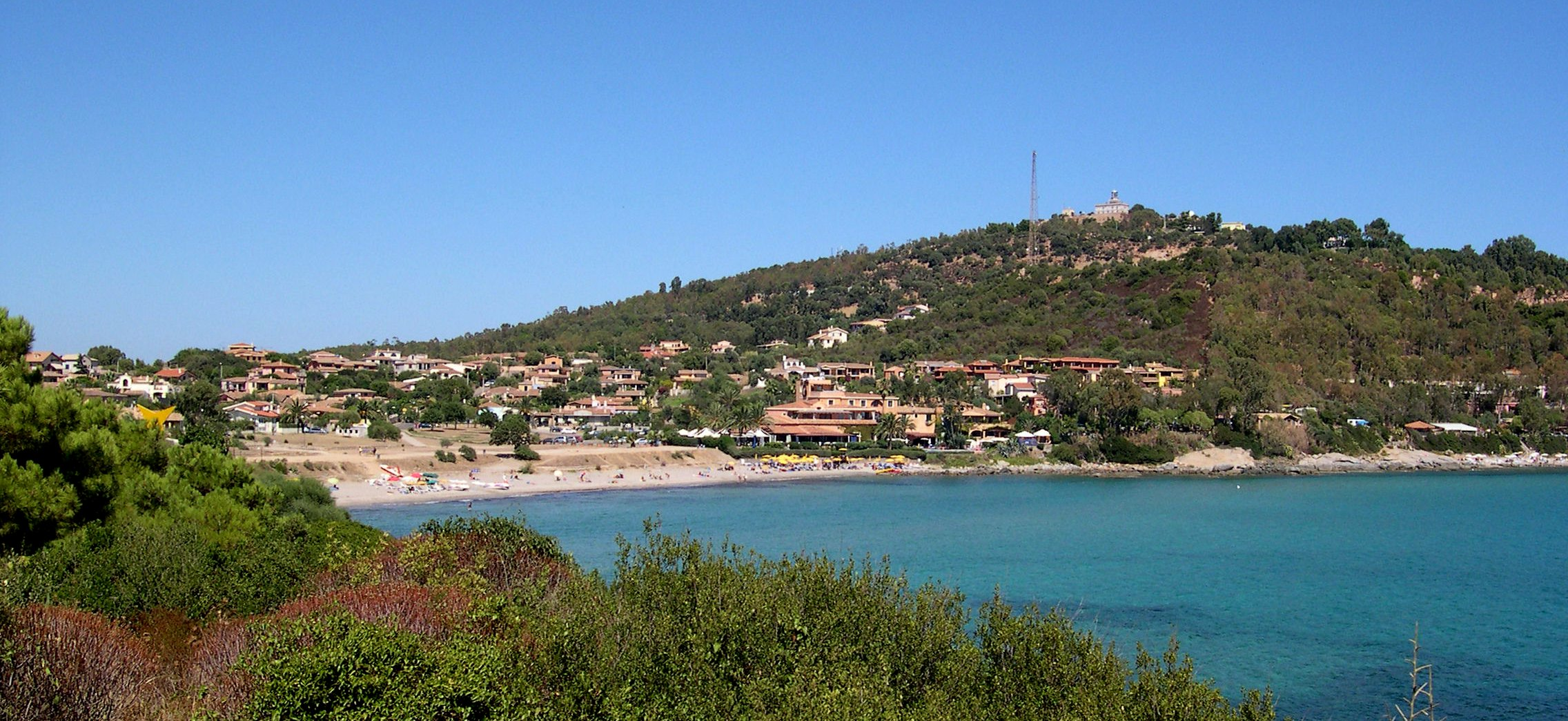 Capo Bellavista: spiaggia di Porto Frailis e Faro di Capo Bellavista